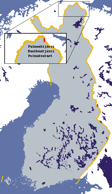 Pulmankijärven sijainti Suomessa * Polmakvatnets läge i Finland* Location of lake Pulmankijärvi in Finland